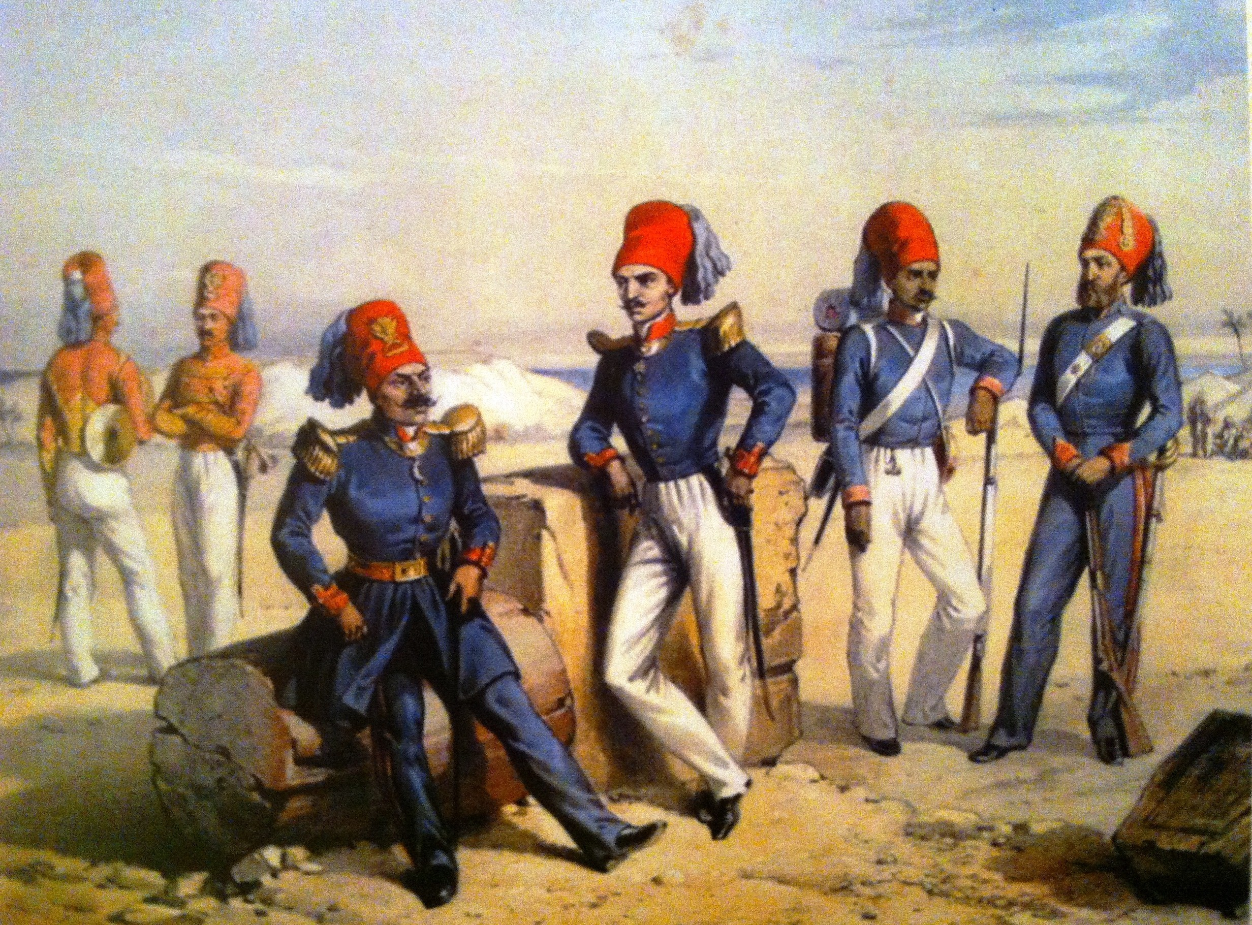 Lithographie montrant des officiers, soldats et trompettes de la marine tunisienne issue des réformes d'Ahmed Ier Bey après 1840